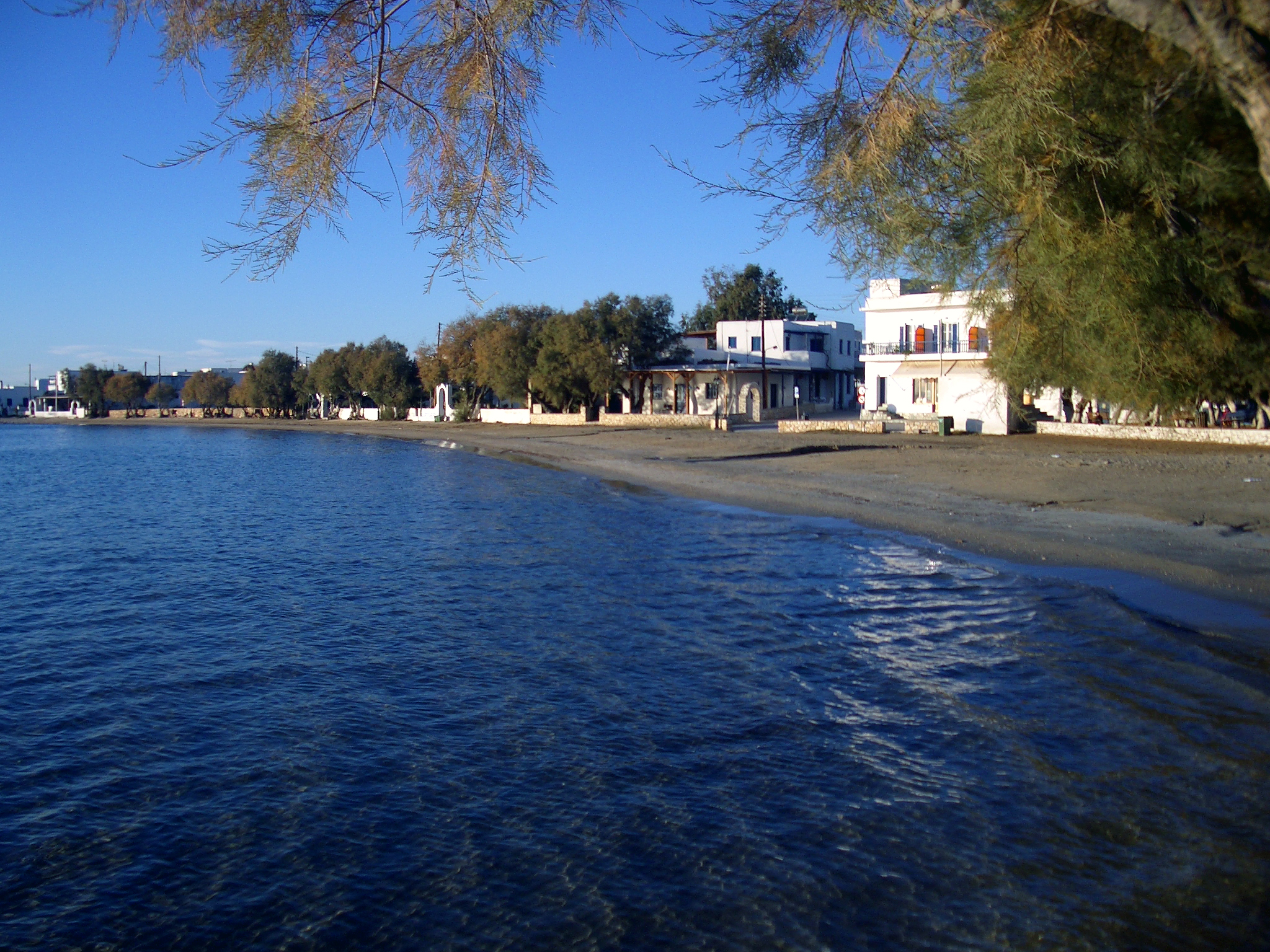 Παραλία Αλυκής Πάρου